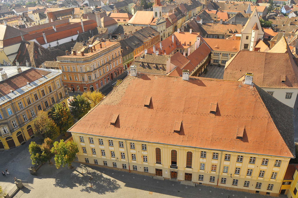 Cladirea din centru-drepata-jos